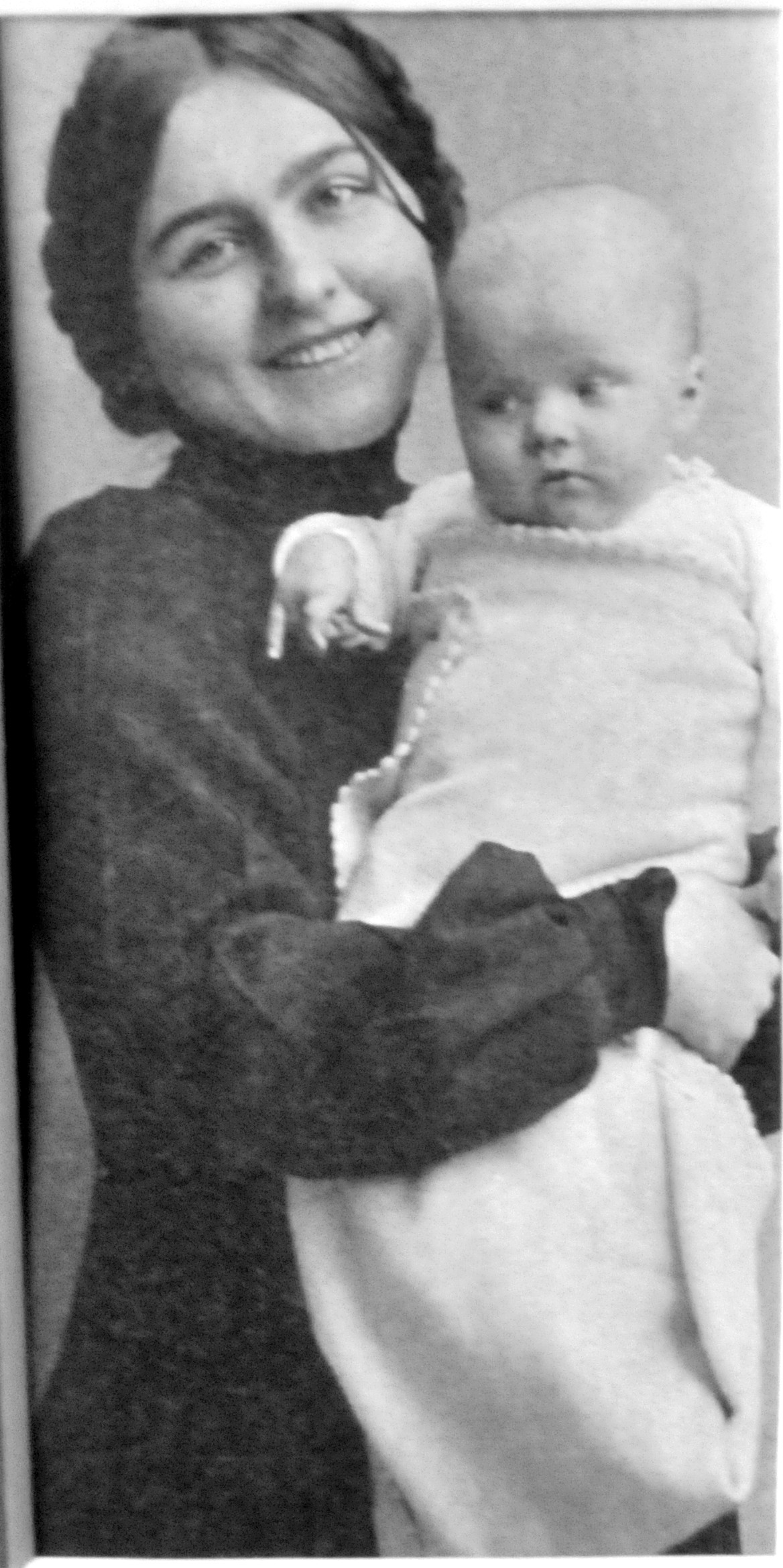 Schloss Tenneberg, Puppenmuseum, Bild von Käthe Kruse